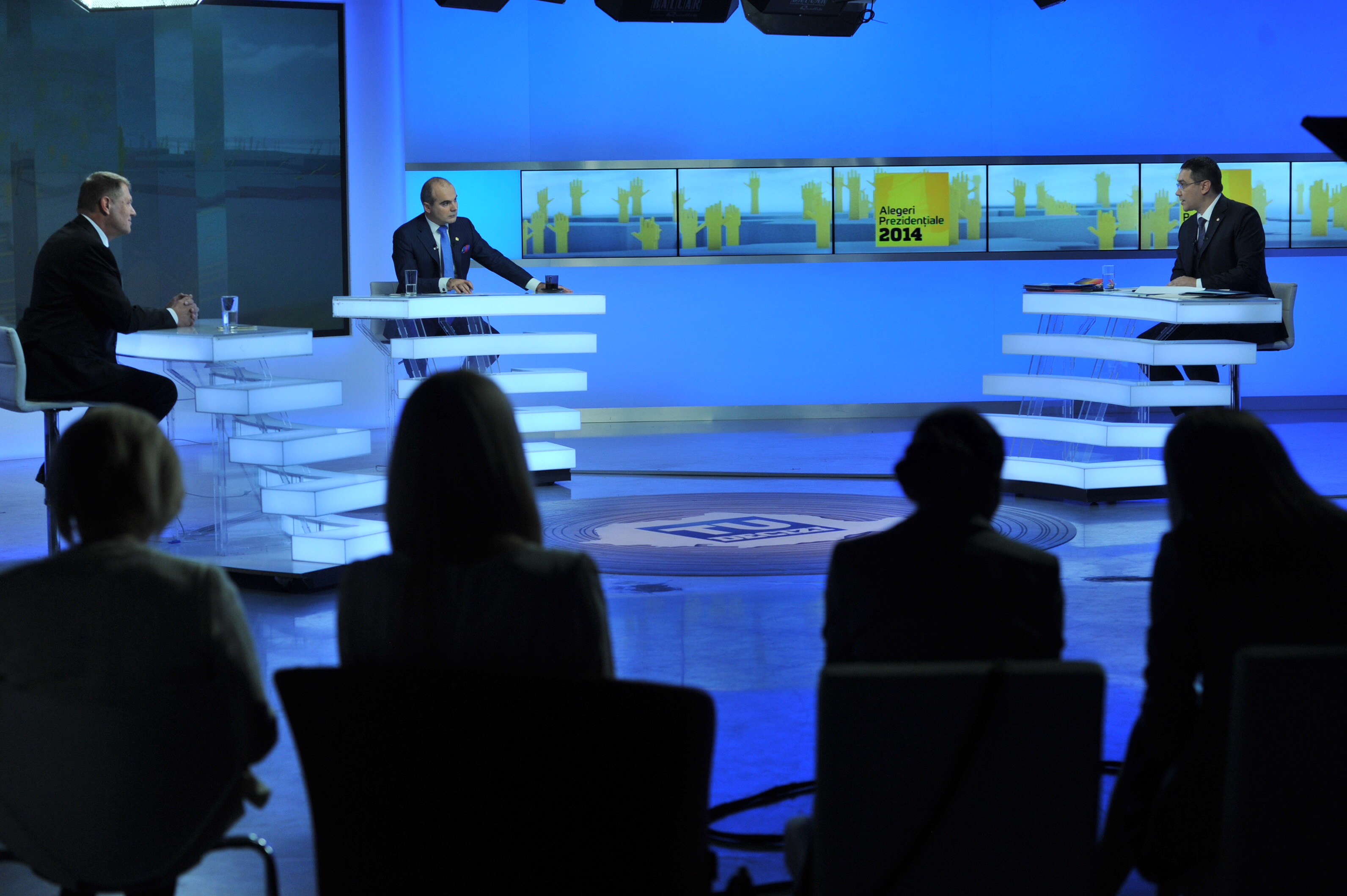 Victor Ponta la dezbatere Realitatea TV - 11.11 (10)